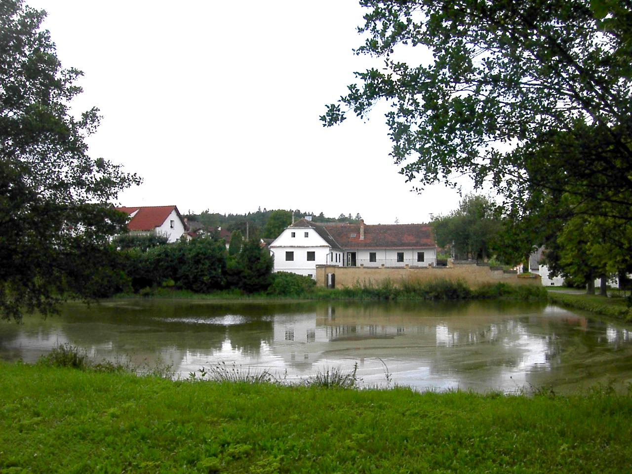 Rybník v Nebílovech.